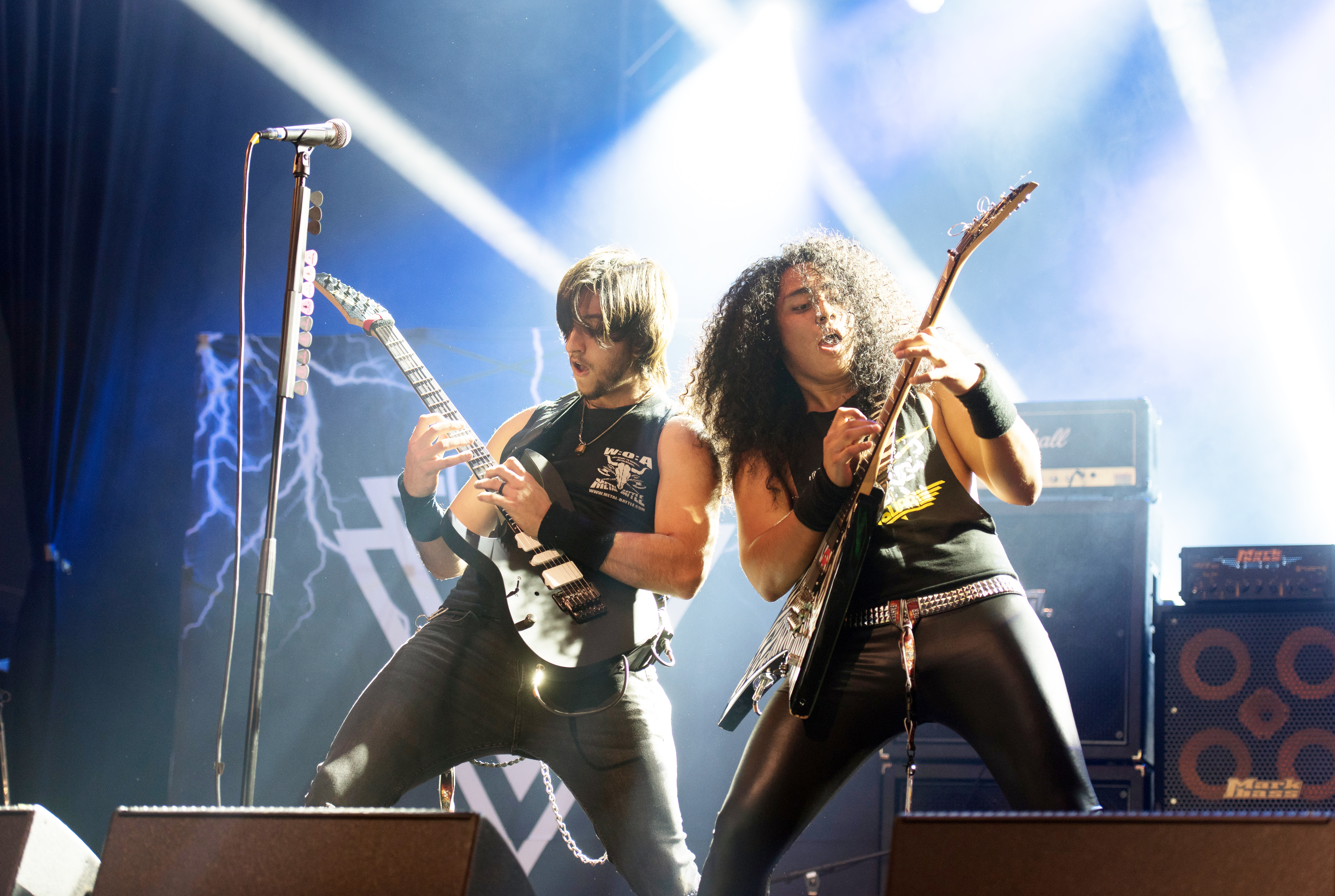 Jet Jaguar beim Wacken Open Air 2017